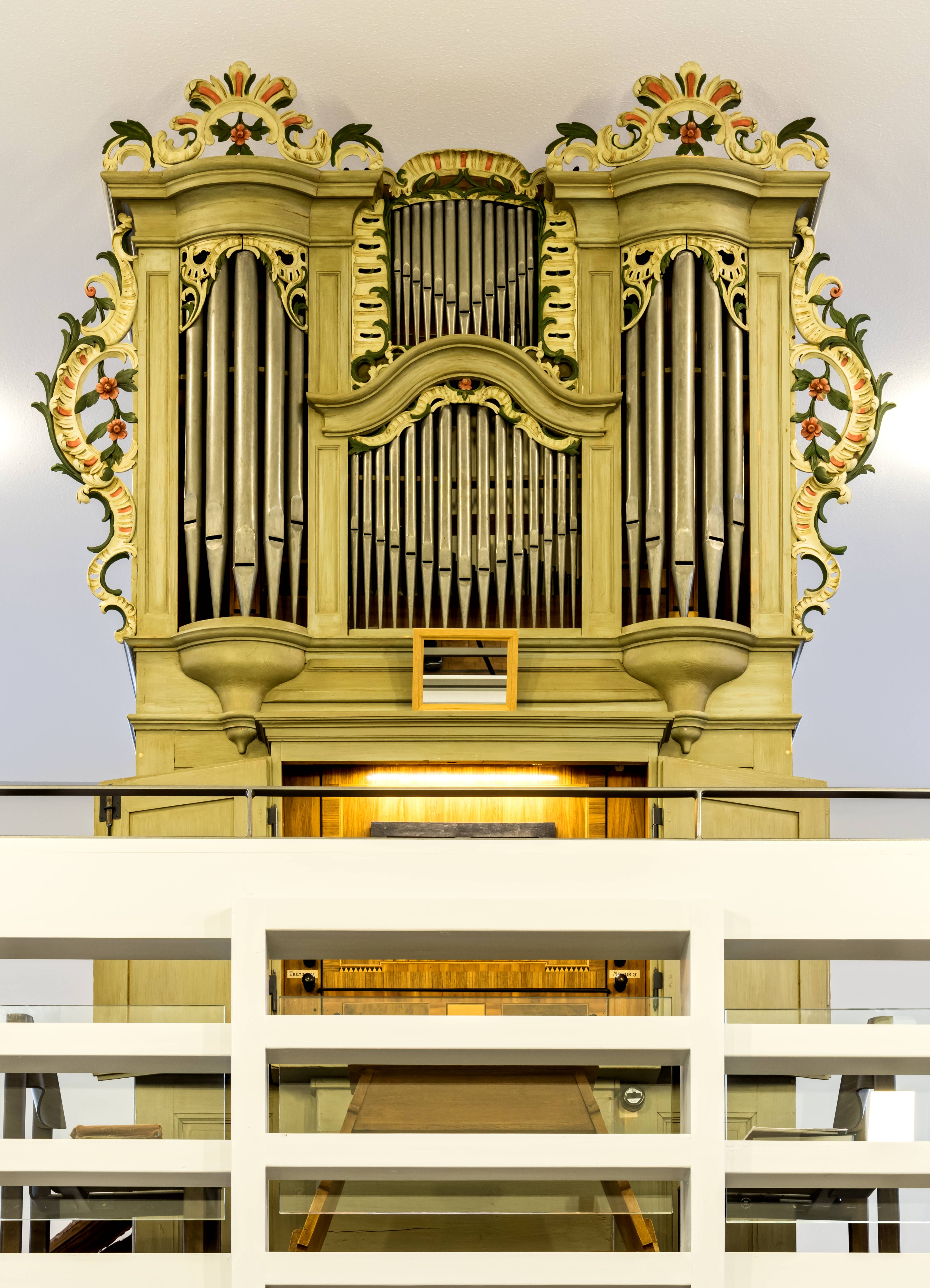 Bilder aus der evangelischen Kirche in Hertingen Die Orgel aus dem Jahre 1787 von Blasius Bernauer